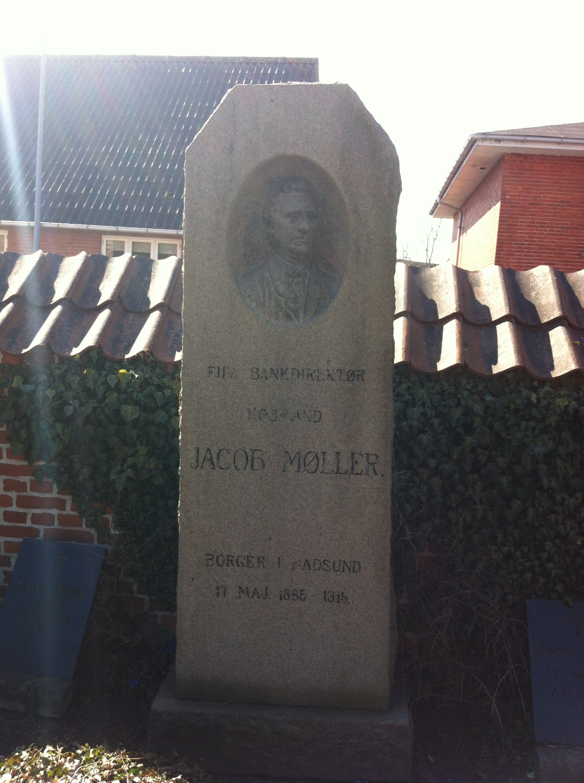 Jacob Møller (1885-1915) var en købmand i Hadsund.